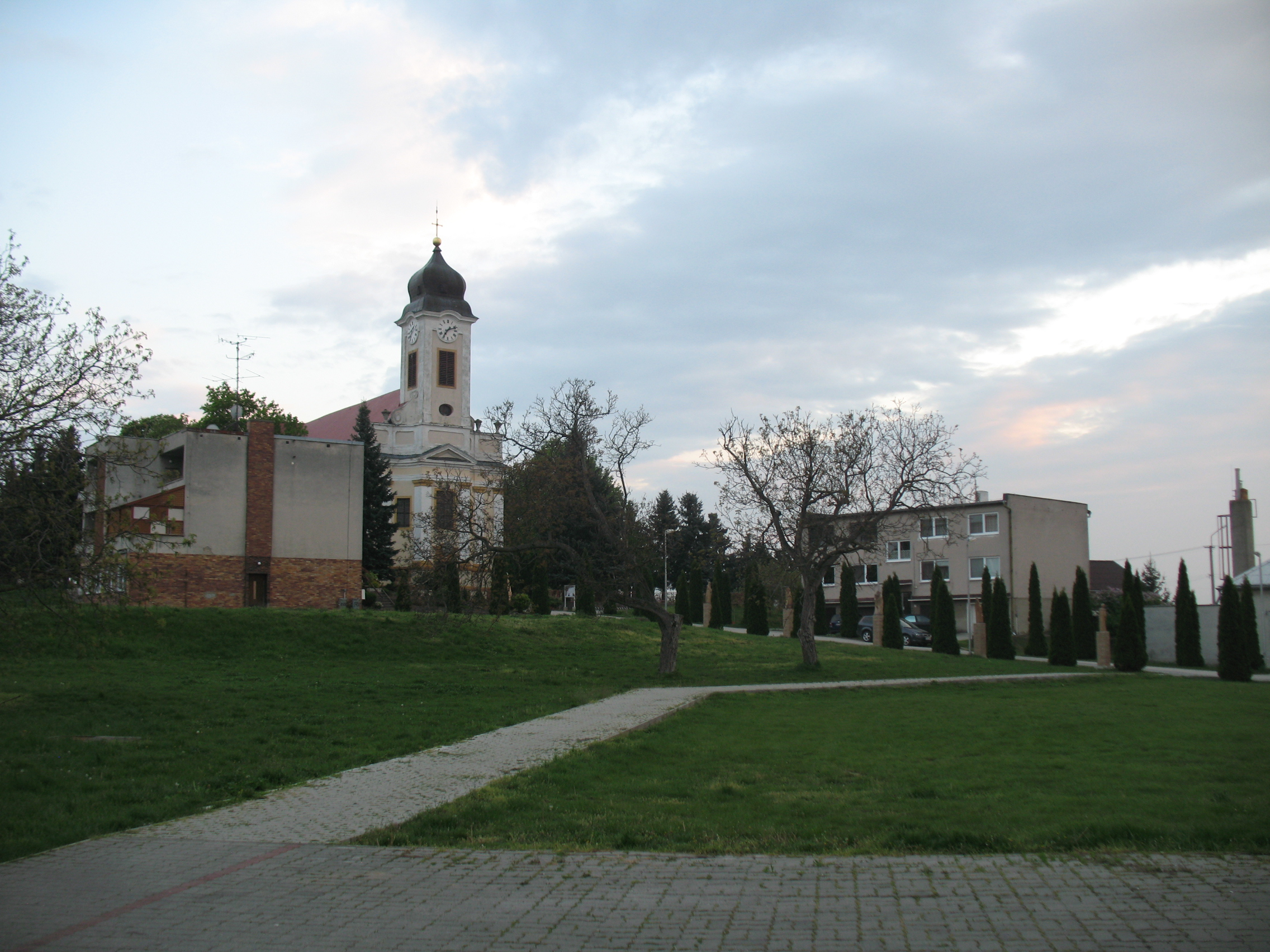 Mánya